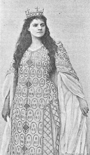 Rose Caron dans Lohengrin par Wilhelm Benque